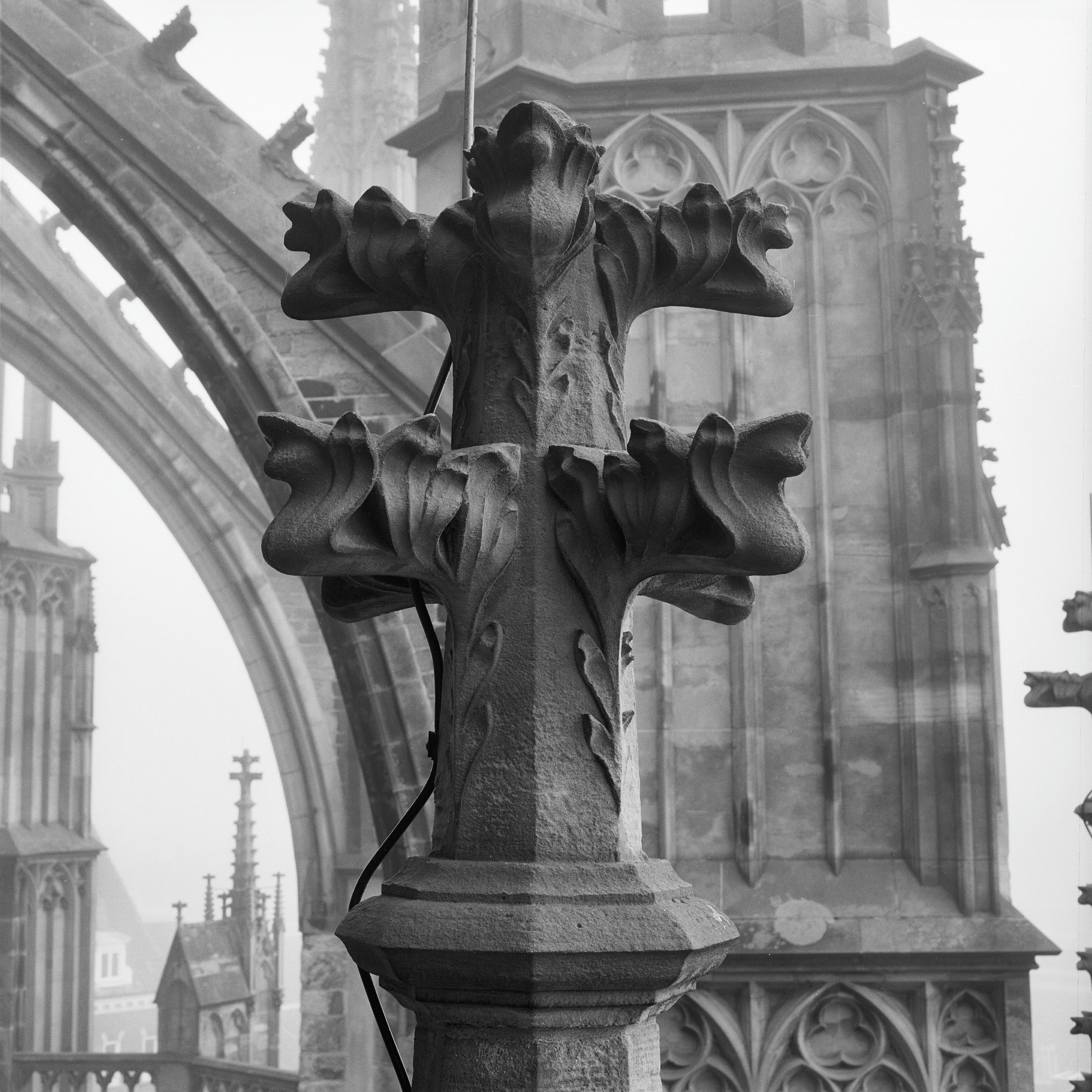 Domkerk: Exterieur KRUISBLOEM PINAKEL KOOROMGANG UDELFANGER